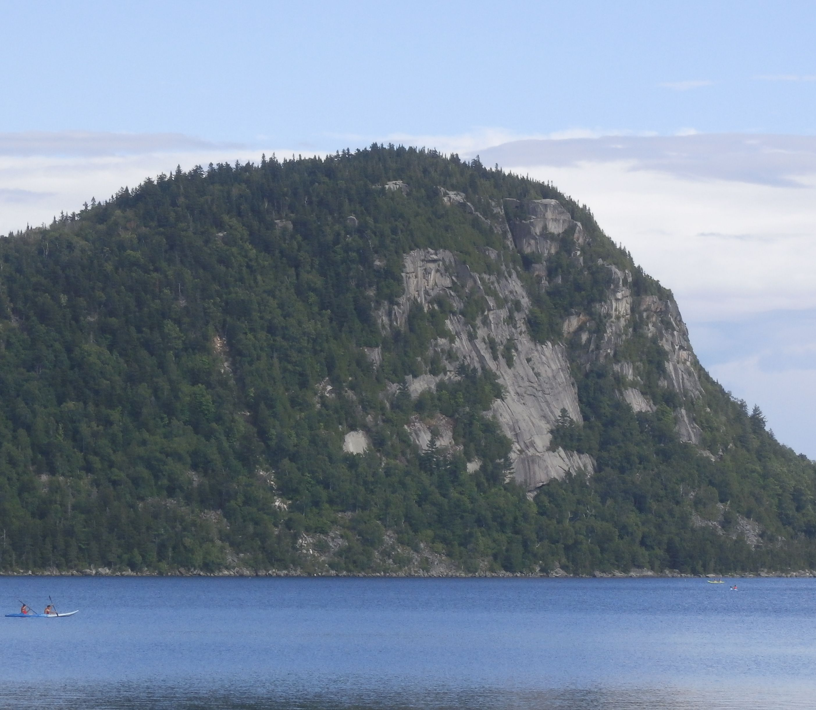 Falaise Pinacle près de Coaticook.